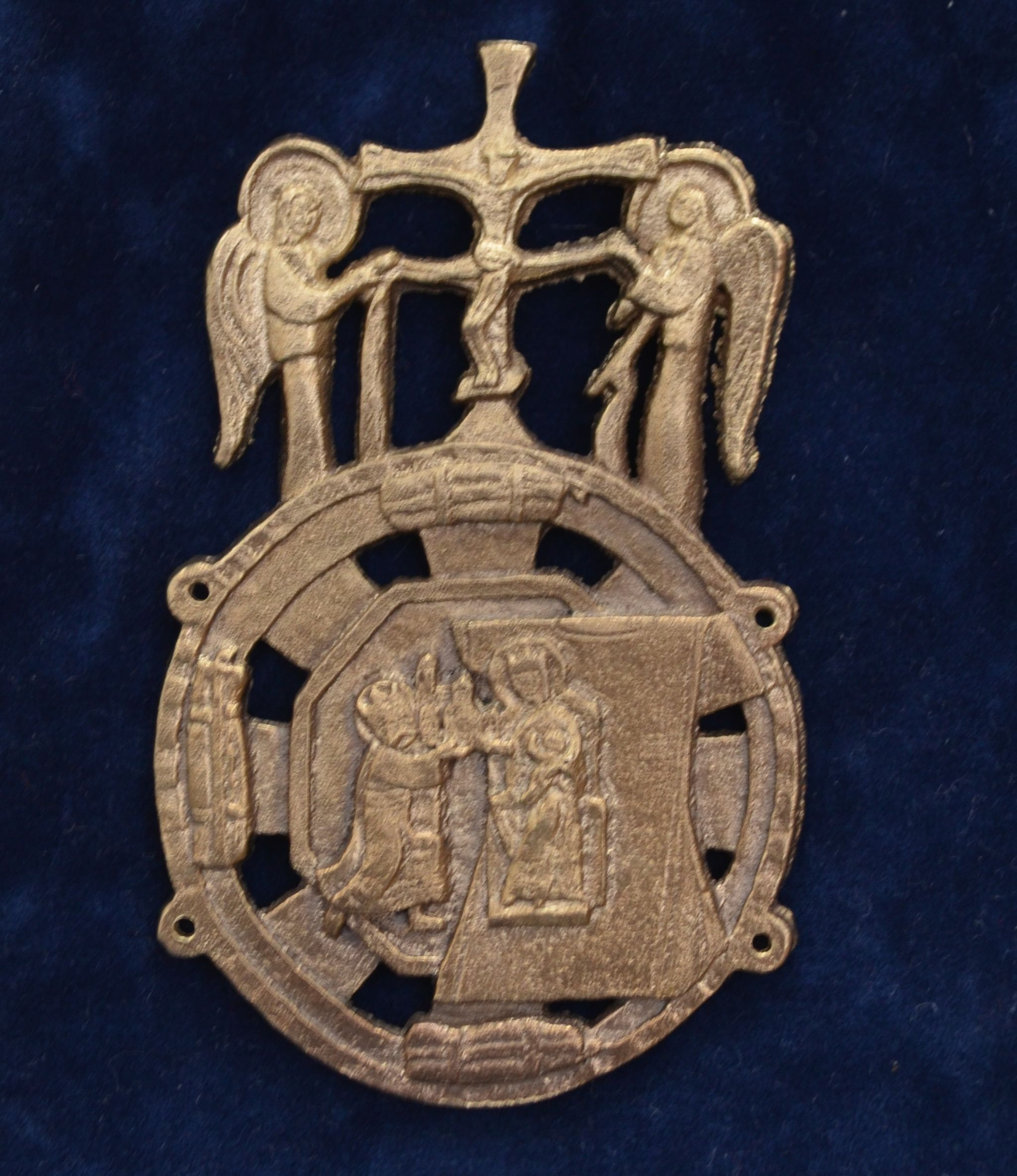 Aachener Pilgerzeichen 2014 von Irene Rothweiler Das Pilgerzeichen zeigt in Kreisform die vier in Aachen verehrten Reliquien: Oben unter dem Kreuz ist „das Lendentuch Christi“ dargestellt, das „Reliquienpaket“ bildet sozusagen einen Sockel für das Kreuz. Die Engel rechts und links vom Gekreuzigten halten Jesu das ausgefaltete Lendentuch. Links am Rand des Pilgerzeichens finden wir das zusammengefaltete „Enthauptungstuch des Hl.Johannes“ und ganz unten die Reliquie der „Windeln Jesu“. Rechts im Pilgerzeichen sehen wir das „Kleid Mariens“, ausgebreitet unter der Darstellung der„Thronenden Muttergottes mit Jesuskind“, die wir vom Goldenen Karlsschrein (1215) kennen. Im Deckelrelief des Karlsschreins widmet Karl der Große der Gottesmutter Maria die Pfalzkapelle: dieses Zitat vom Karlsschrein erscheint im Pilgerzeichen des Jubiläumsjahres 2014. Ebenfalls ist die Einzeichnung des Oktogons als Grundriss der Pfalzkapelle ein Motiv, dass im besonderen Karlsjahr im Pilgerzeichen aufgenommen wird. Das Motto der Heiligtumsfahrt aus dem Buch Genesis: „Zieh in das Land, das ich Dir zeigen werde“ (Gen.12,1), ist im Symbol des Rades mit Speichen zusammengefasst. Der persönliche Weg des Glaubens, das Pilgern des Suchenden zu den Reliquien als Hinweiszeichen zu Gott, die Bewegung hin auf das ewige Ziel, dies ist in Aachen während der Heiligtumsfahrt in Freude und Gemeinschaft lebendig und traditionell. Auch das Pilgerzeichen gehört zur Tradition, es wurde früher an Kleidung oder Gegenstände aufgenäht. Deswegen sind auch im neu gestalteten Pilgerzeichen die vier Ösen beibehalten.